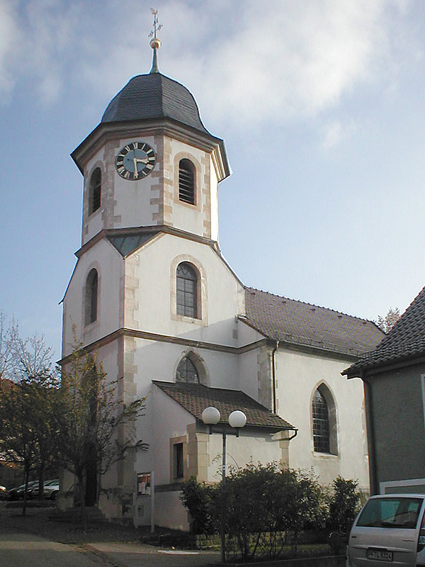 Kirche in Sternenfels, Enzkreis, Baden-Württemberg